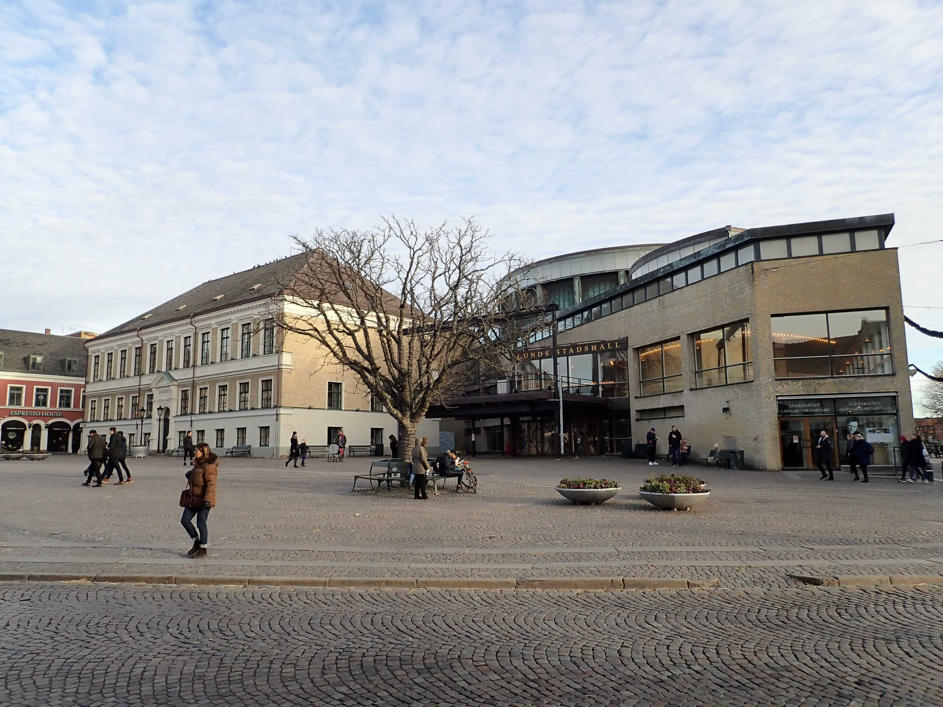 Rådhuset och Lunds stadshall (Klas ̈Anshelm, 1968), vid Stortorget i Lund, den 3 januari, 2019